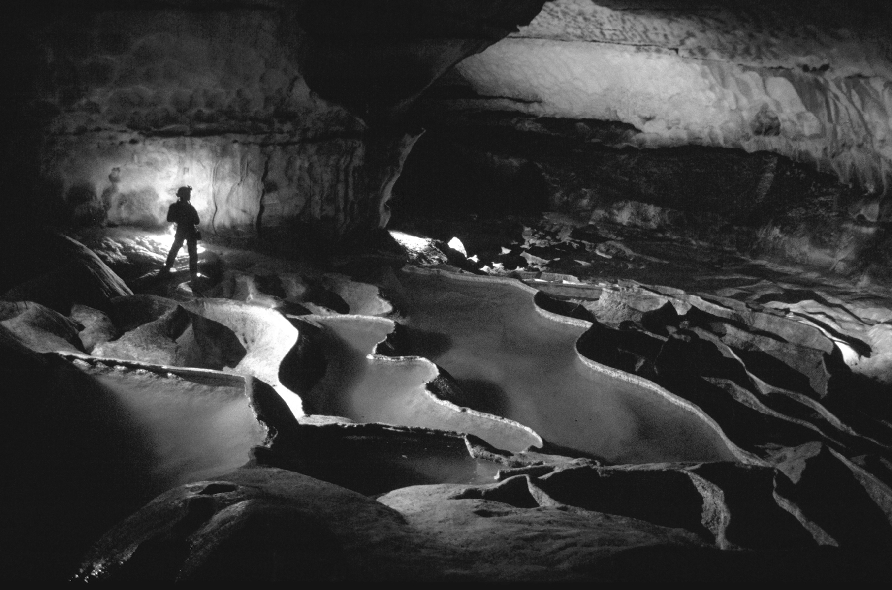 Grotte de Saint-Marcel, Saint-Marcel (Classé, 1934) .